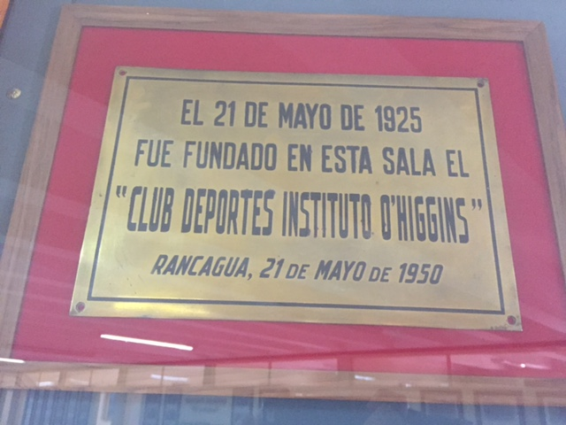 Placa conmemorativa de la fundación del Club de Deportes del Instituto O'Higgins de Rancagua, de los Hermanos Maristas. Instalada con motivo de los 25 años de la institución deportiva. Ubicada en el establecimiento educacional.